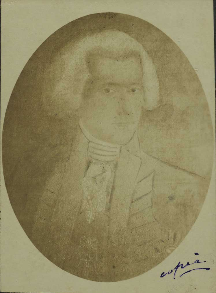 [Capitão General Caetano Pinto de Miranda Montenegro [Iconográfico] : Marquês de Villa Real de Praia Grande / 1º Senador pela Província de Matto Grosso]